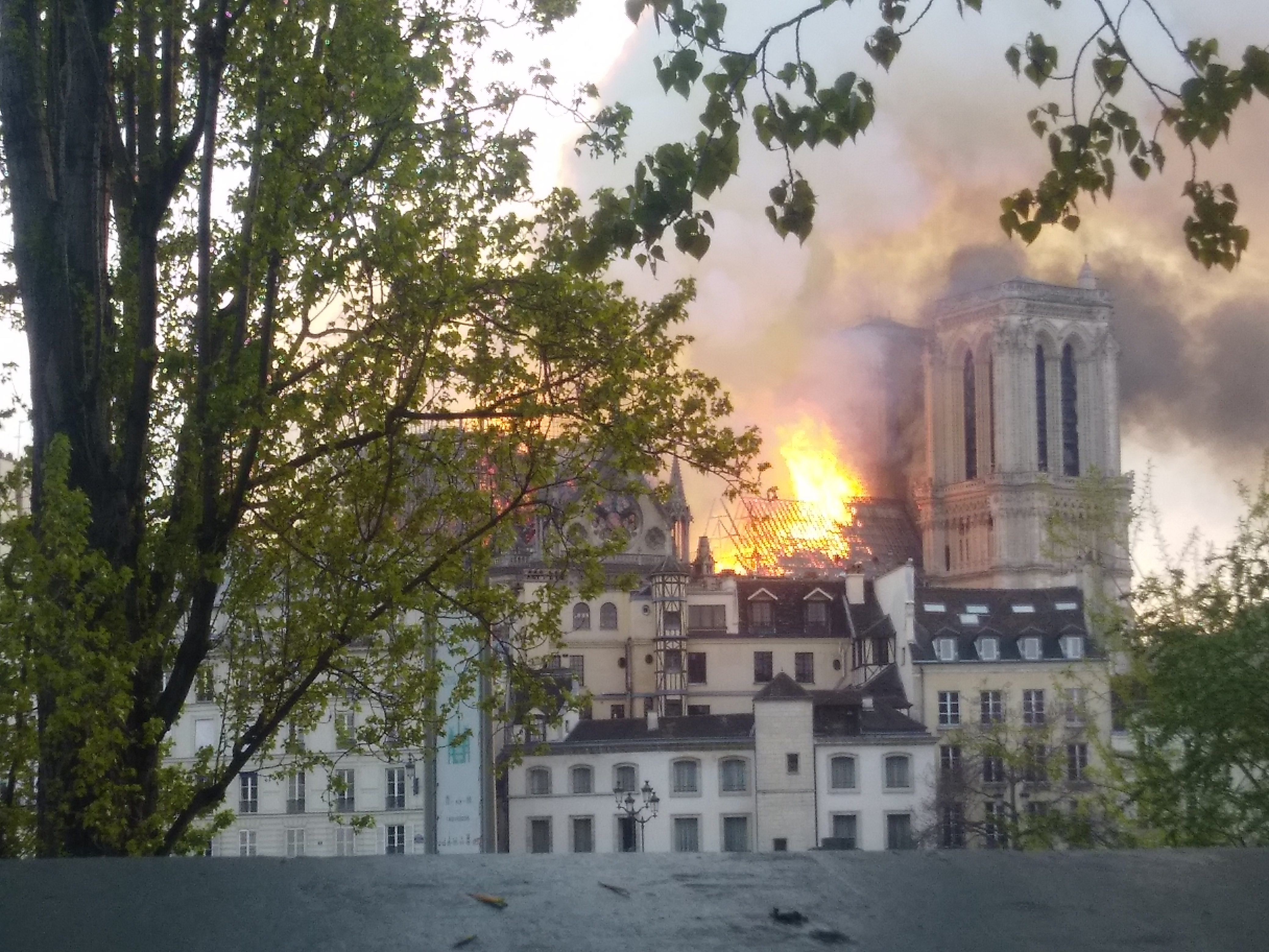 Incendie de Notre-Dame-de-Paris 15 avril 2019